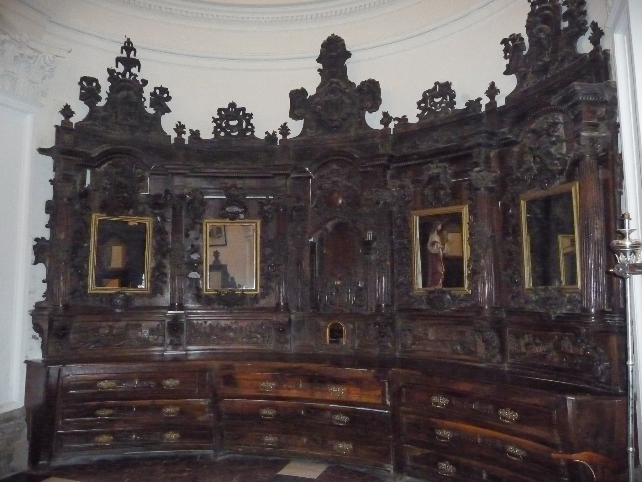 Iglesia de Santo Tomás. Haro, La Rioja (España) - Armario frontal de Sacristía.